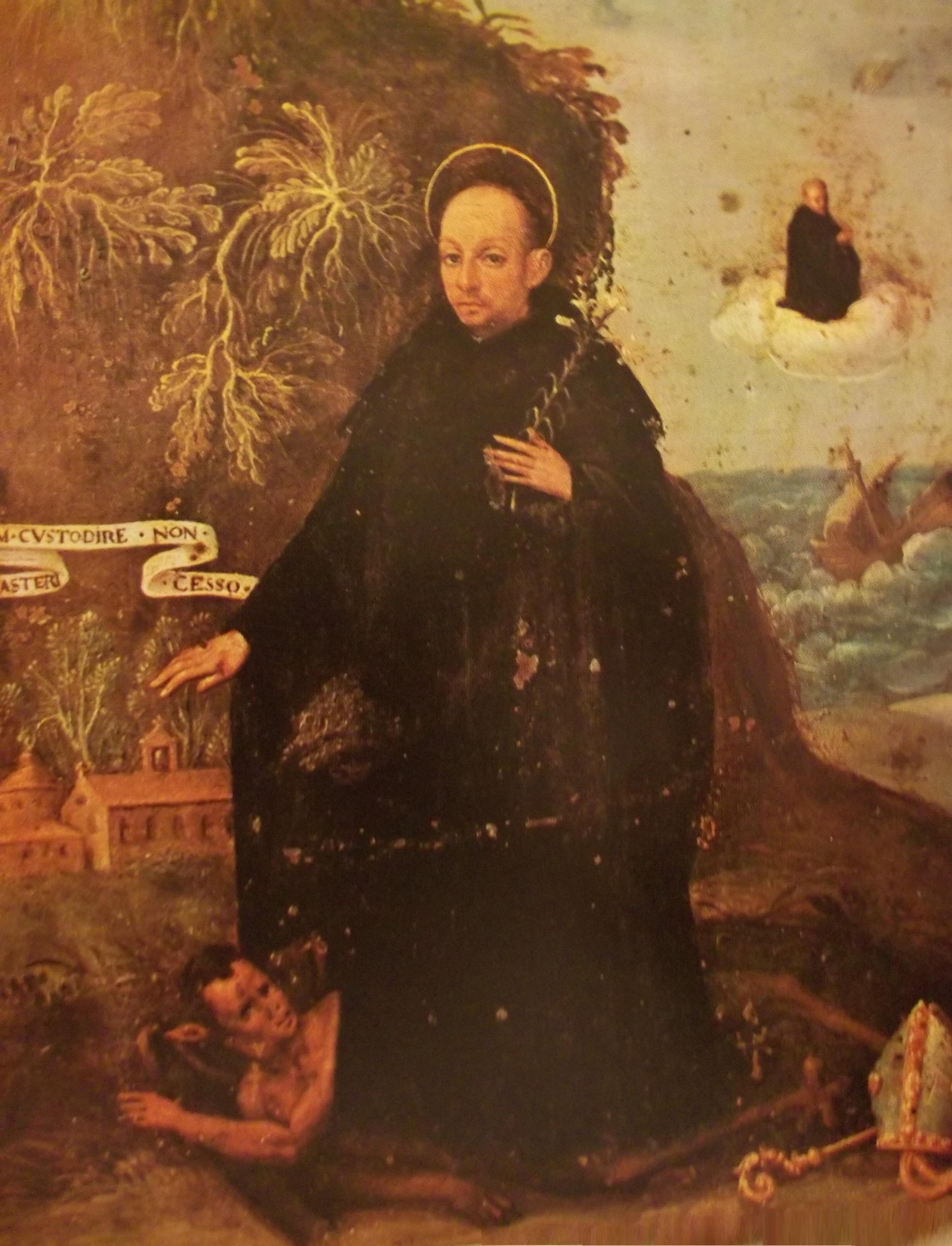 Foto-riproduzione di un dipinto di Autore anonimo Ruggero S. Costabile ed il miracolo della nave del monastero salvata dal naufragiosecolo XVI. Abbazia SS. Trinità di Cava de' Tirreni (Italia)